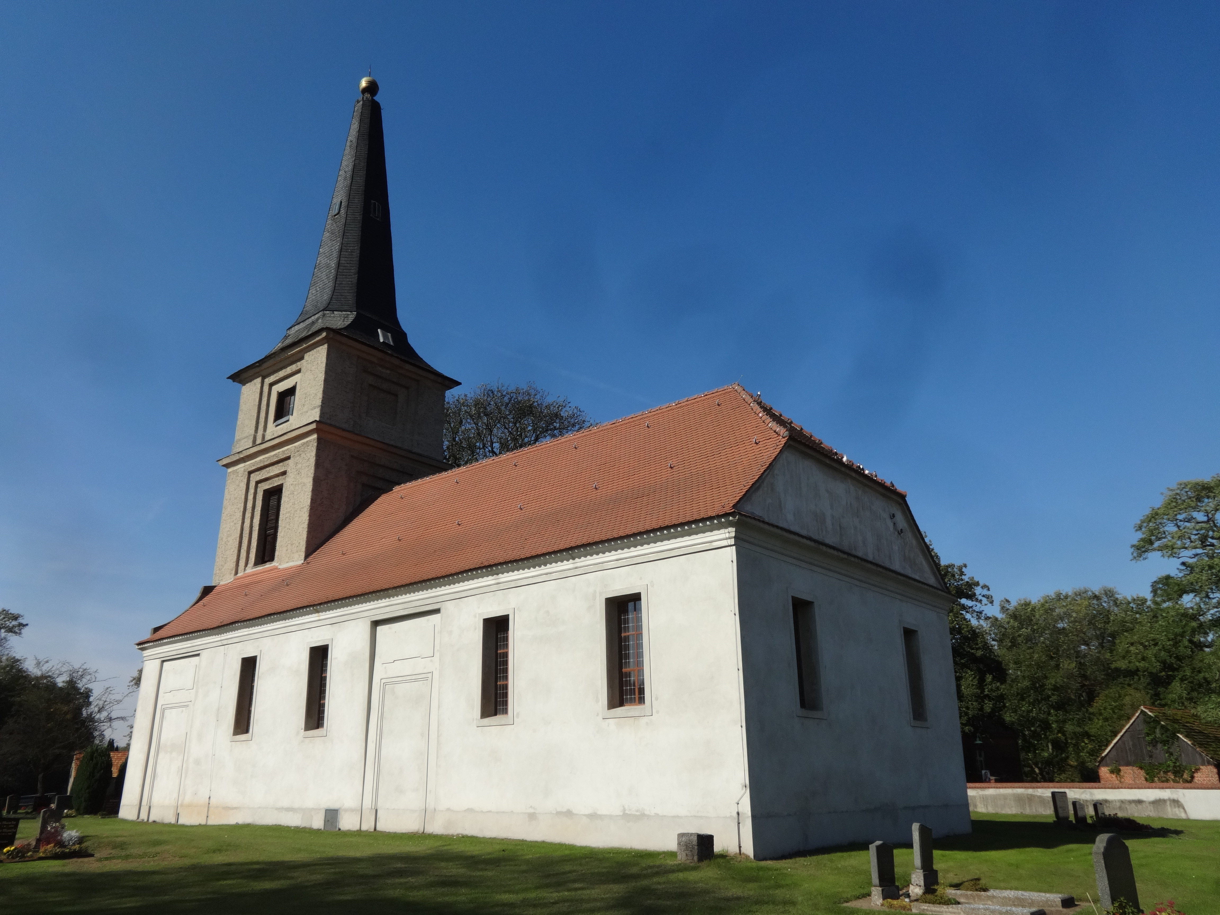 Die Dorfkirche in Groß Rietz in der Gemeinde Rietz-Neuendorf im Landkreis Oder-Spree in Brandenburg entstand im Jahr 1704. In ihrem Innern ist eine barocke Ausstattung aus der Bauzeit.